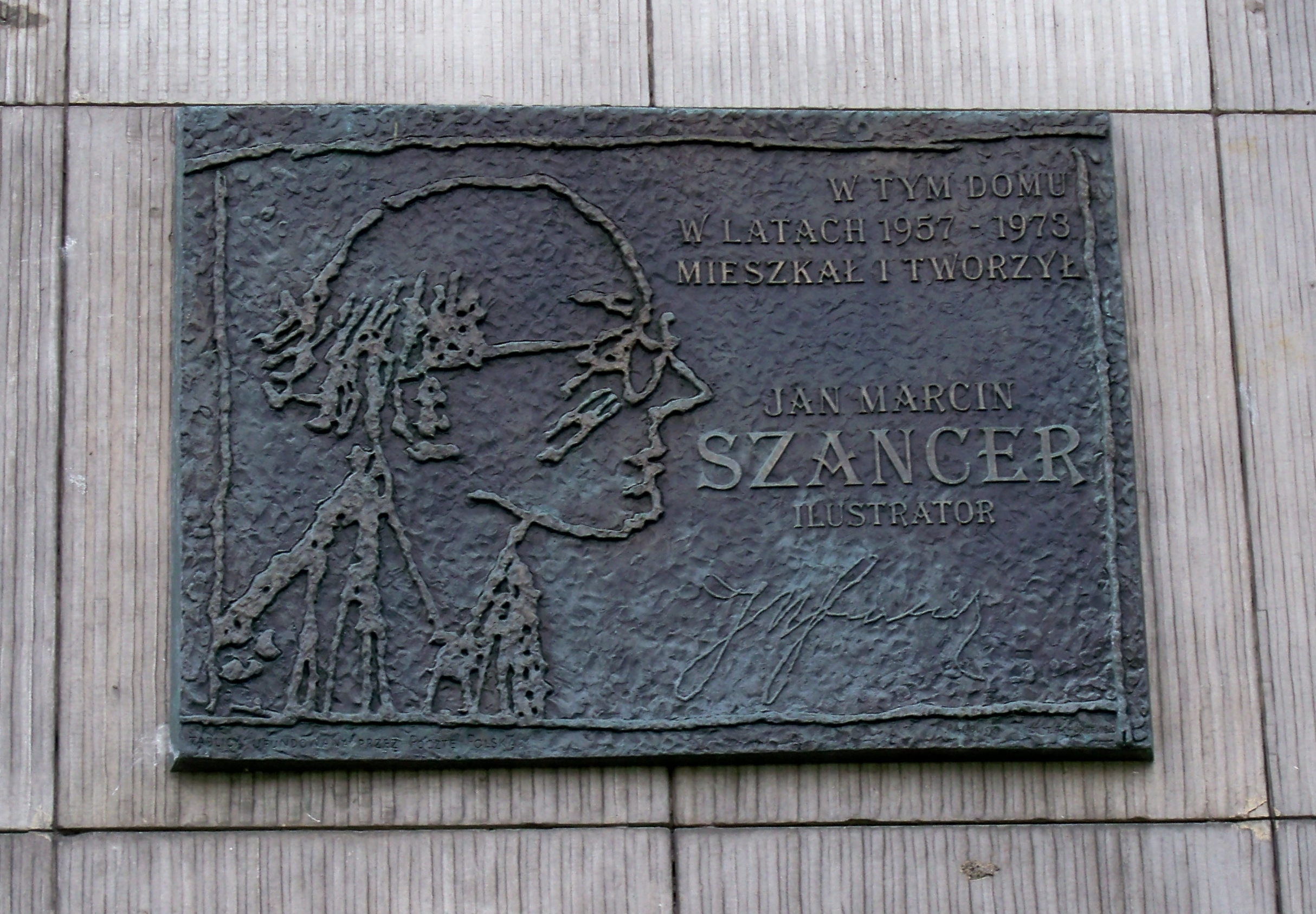 Tablica upamiętniająca J. M. Szancera. Ul. Karowa 14/16 w Warszawie.